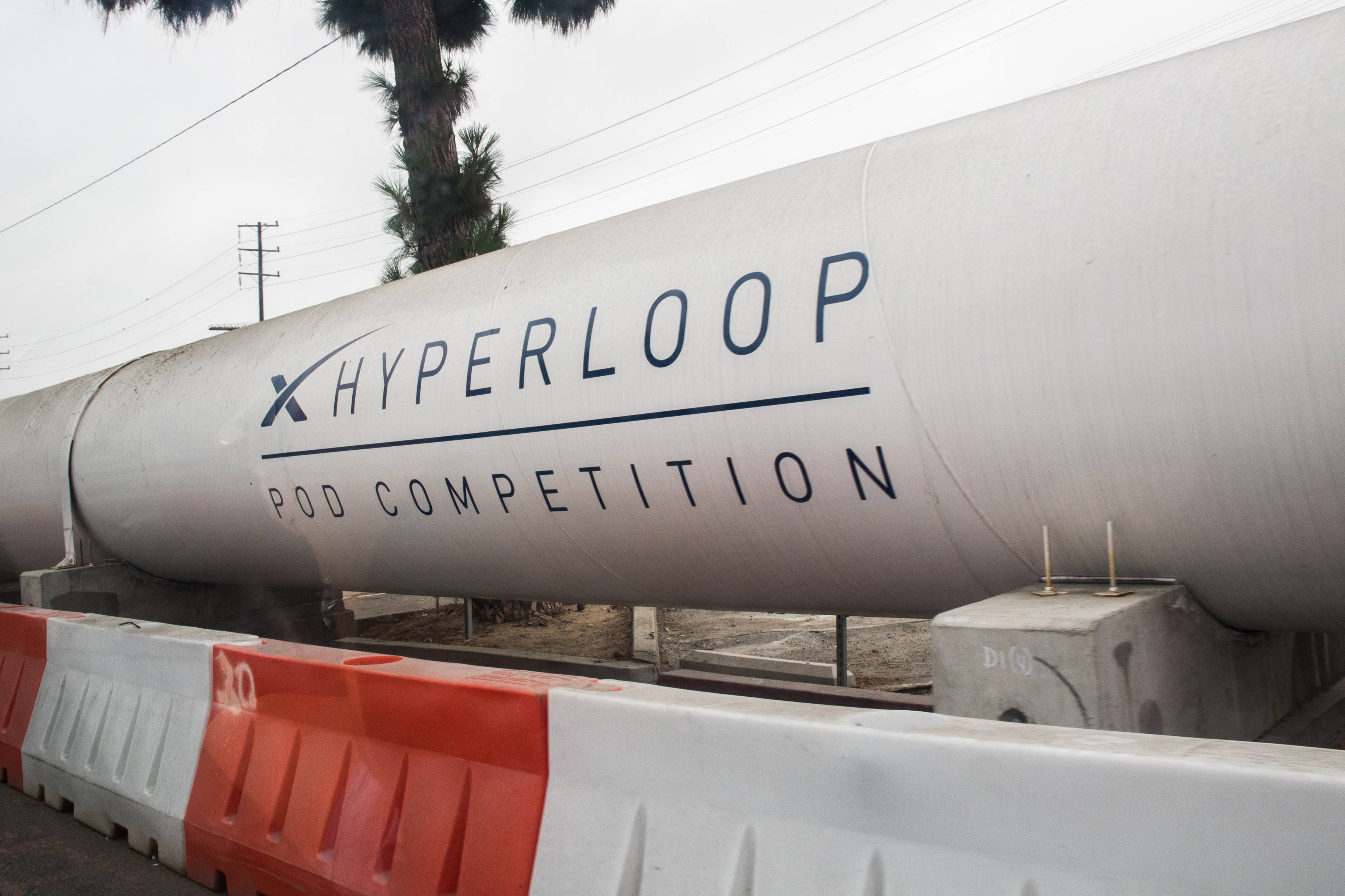 Труба для Hyperloop pod competition